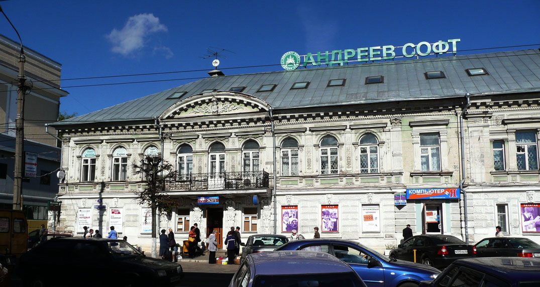 Novotorzhskaya Street, 21